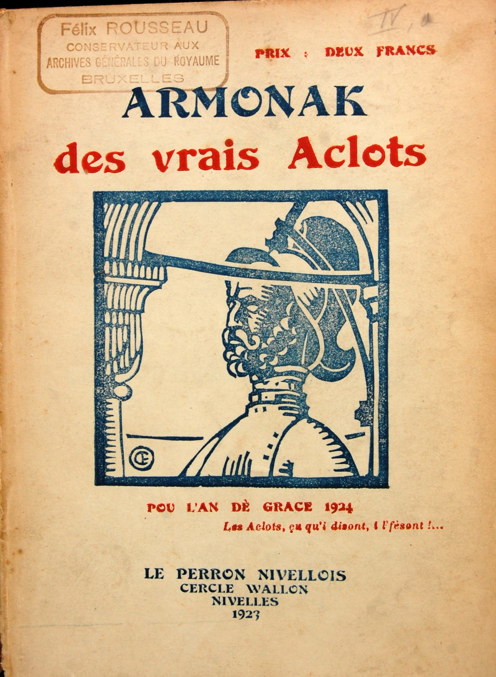 Walon: Coviete di l' Årmonak des vraiys Aclots po 1924 eplaidî e 1924.